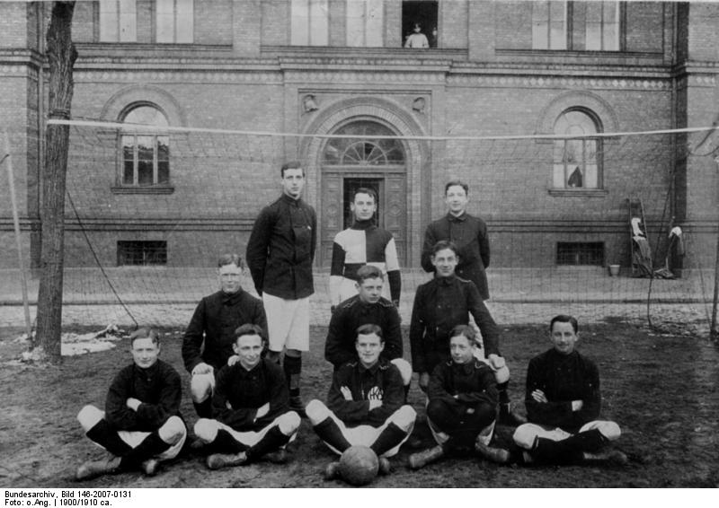 Fußballklub. In neuere Zeit hat dieser Sport immer mehr Eingang im Kadettenkorps gefunden, besonders seitdem der große Exerzierplatz vor der Südfront für sportliche Übungen freigegeben worden ist.